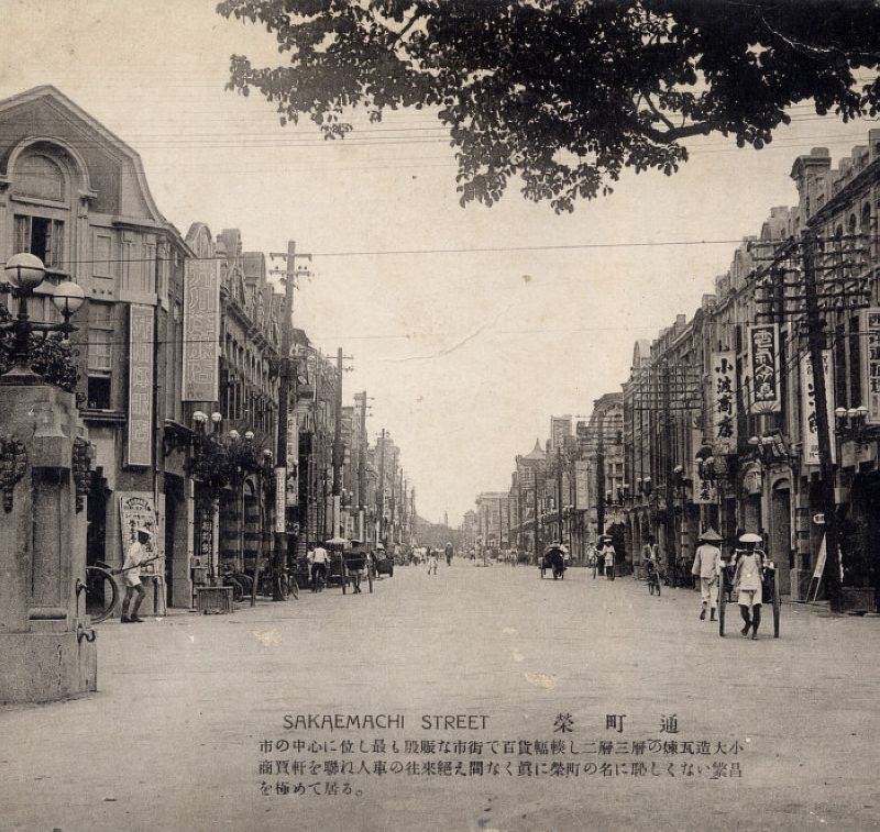 臺北榮町通